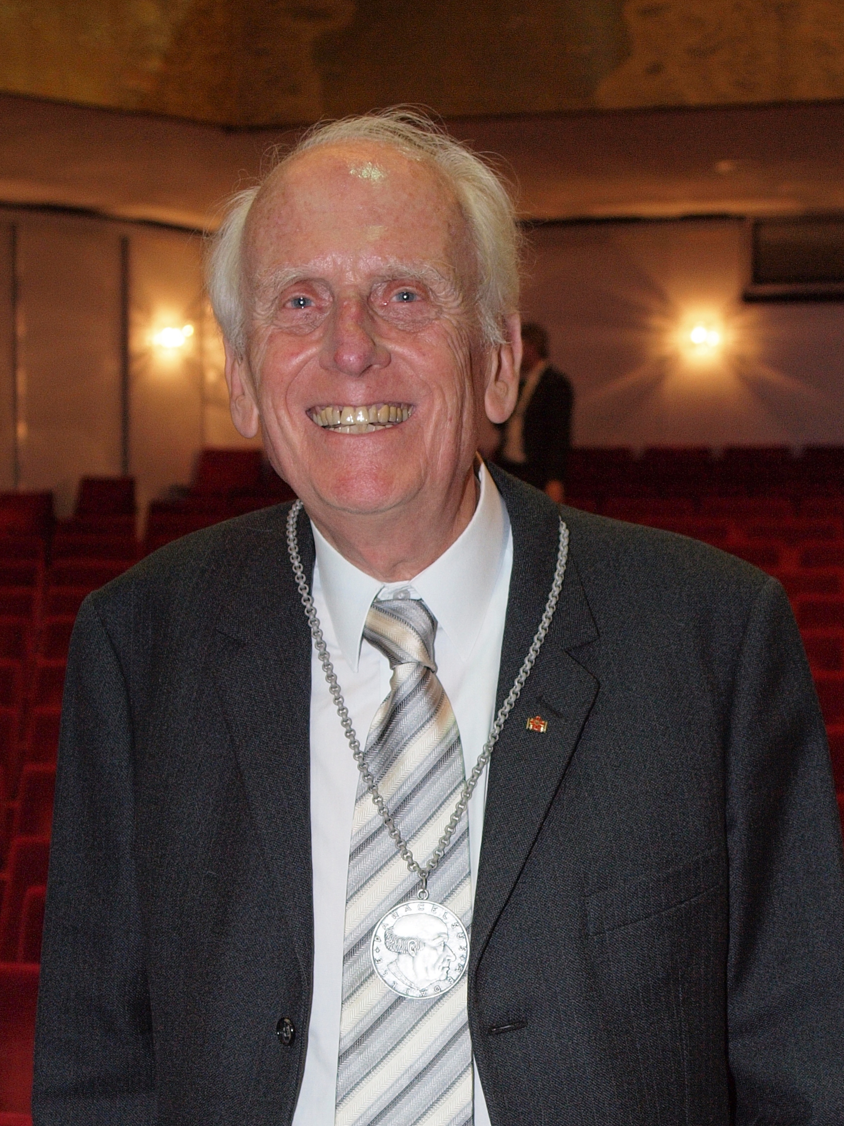 Ulrich Gottstein anlässlich der Verleihung der Paracelsus-Medaille beim 114. Deutschen Ärztetag in Kiel